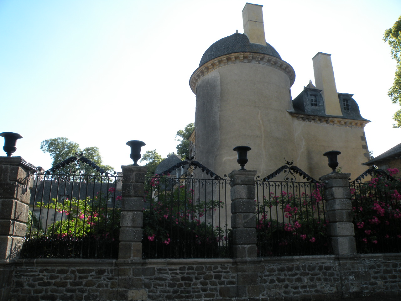 Château de Beauvais à Gévezé.